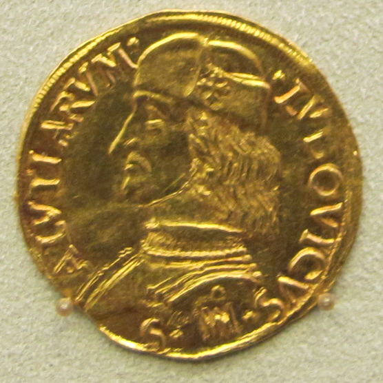 Saluzzo, ludovico II, ducato, 1475-1504